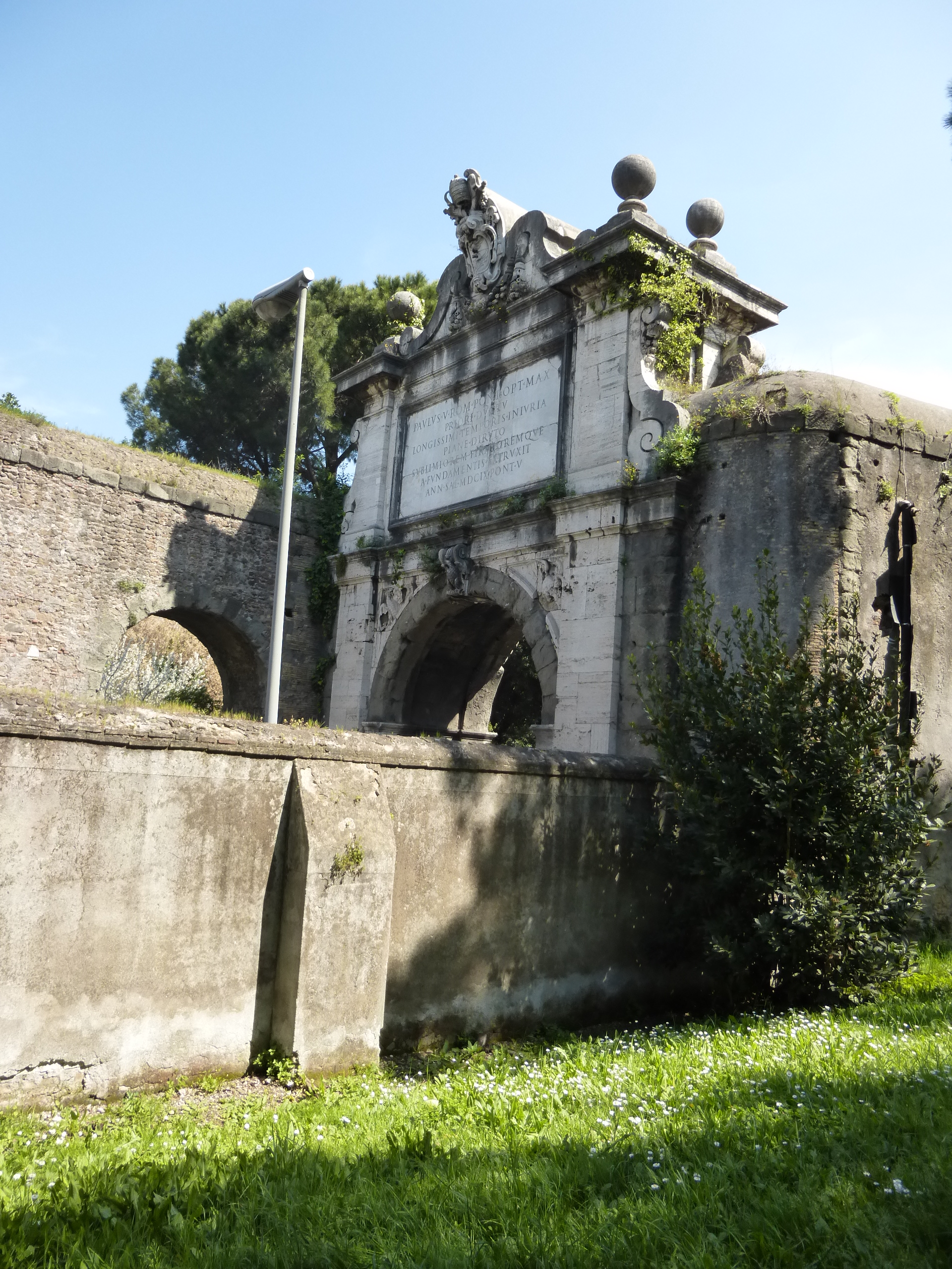 Roma, villa Doria Pamphili. Di là dal muro l'arco di Paolo V per il passaggio dell'Acquedotto Paolo sulla via Aurelia antica, detto "Arco di Tiradiavoli". Secondo la leggenda i diavoli erano quelli che pungolavano la carrozza del fantasma di Donna Olimpia Maidalchini, quando di notte la riportava alla villa.